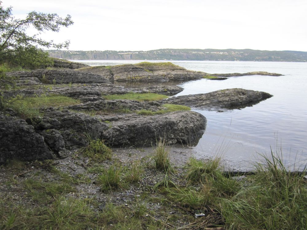 Den lagdelte kalksteinen er godt synlig på Langøya.